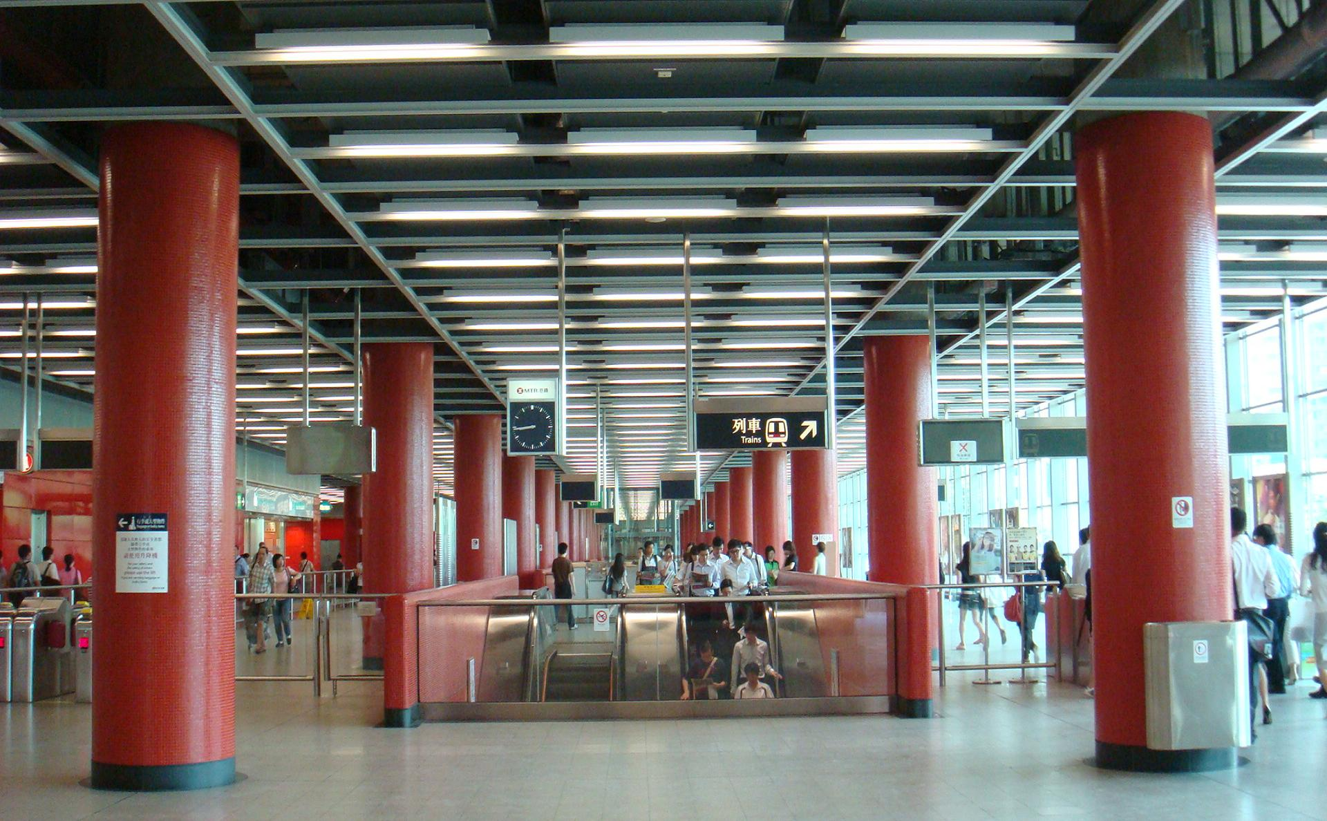 將軍澳站